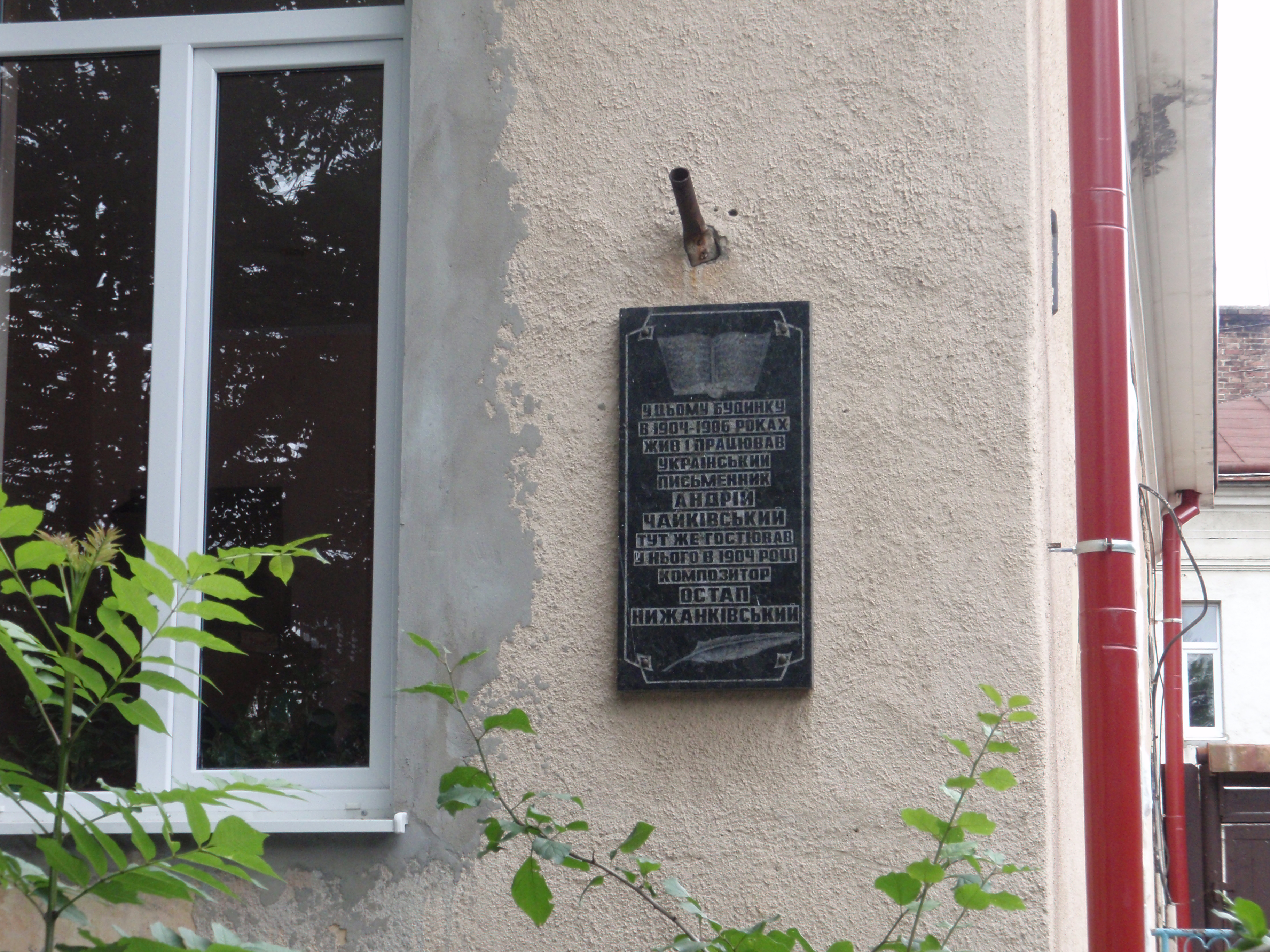 Меморіальна дошка на будинку, де мешкав письменник Андрій Чайківський